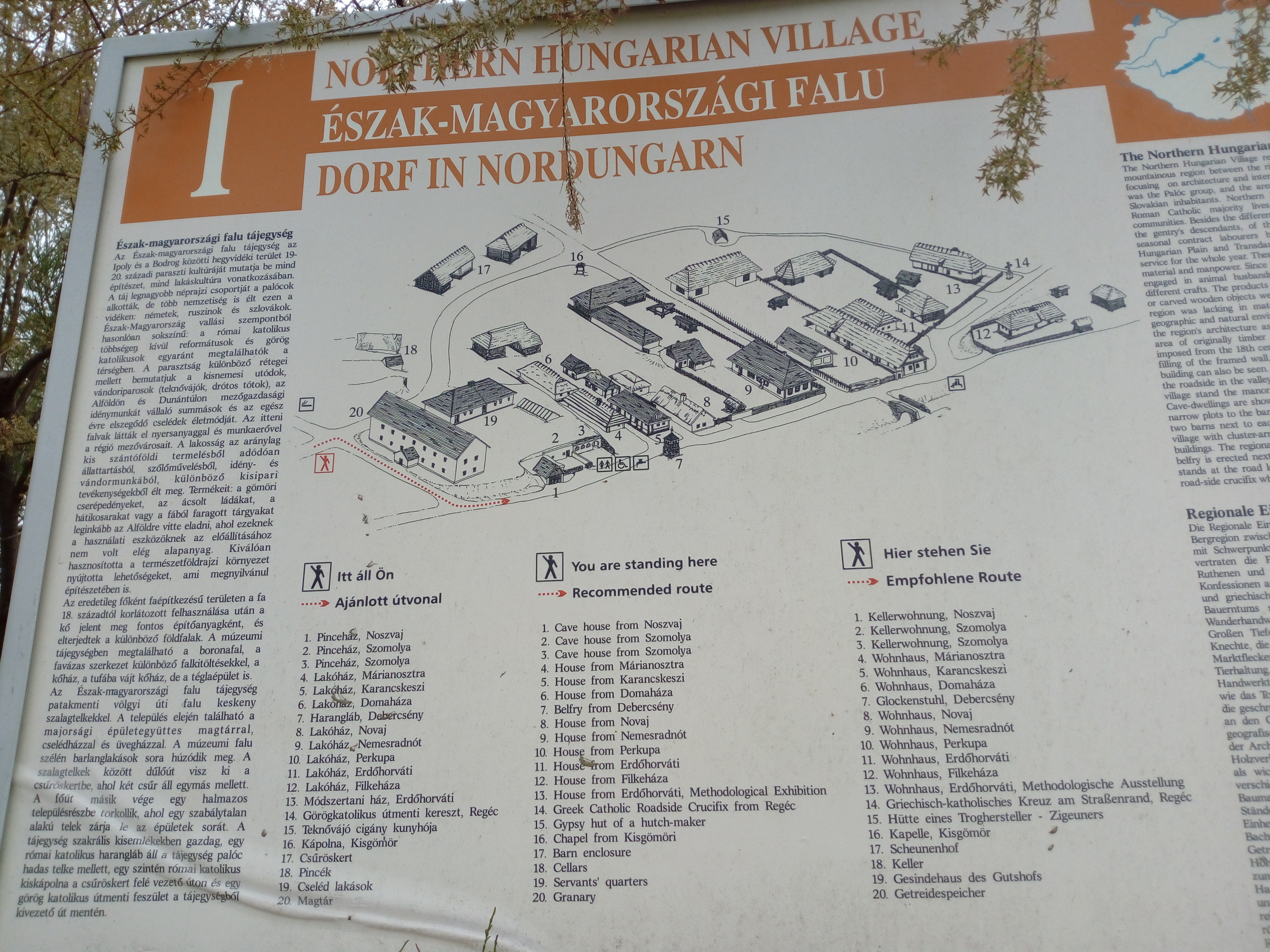 Felső-magyarországi falu áttekintő térkép